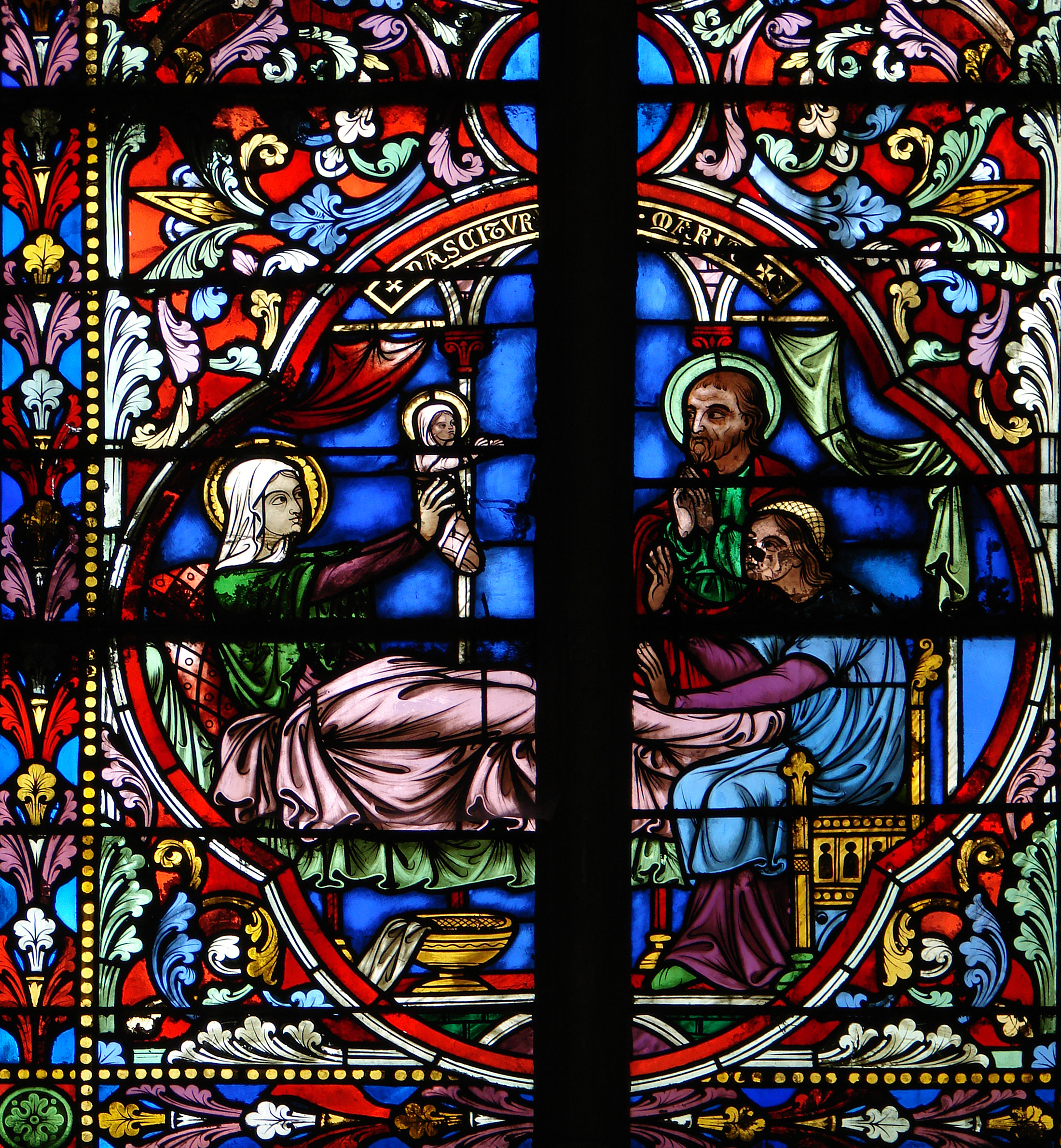 Détail d'une verrière néogothique de la cathédrale de Meaux, datée de 1875, et illustrant la vie de la Vierge: la naissance de Marie.